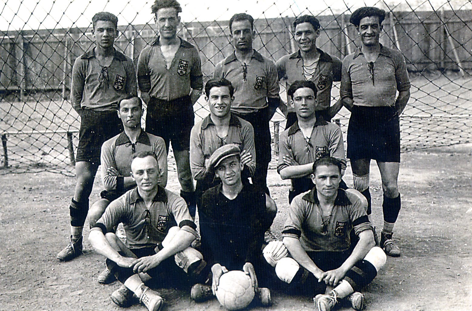 Η ομάδα του Άρη Θεσσαλονίκης πρωταθλήτρια Ελλάδας 1928